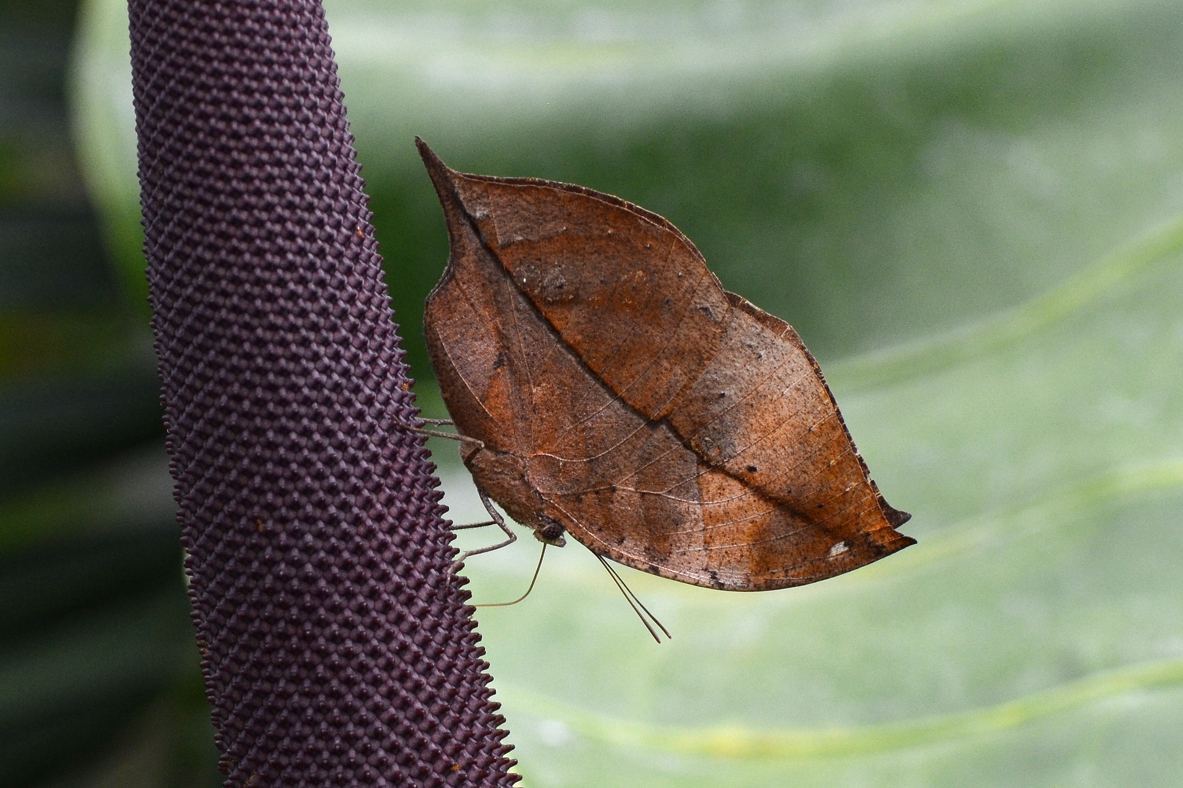 Kallima inachus